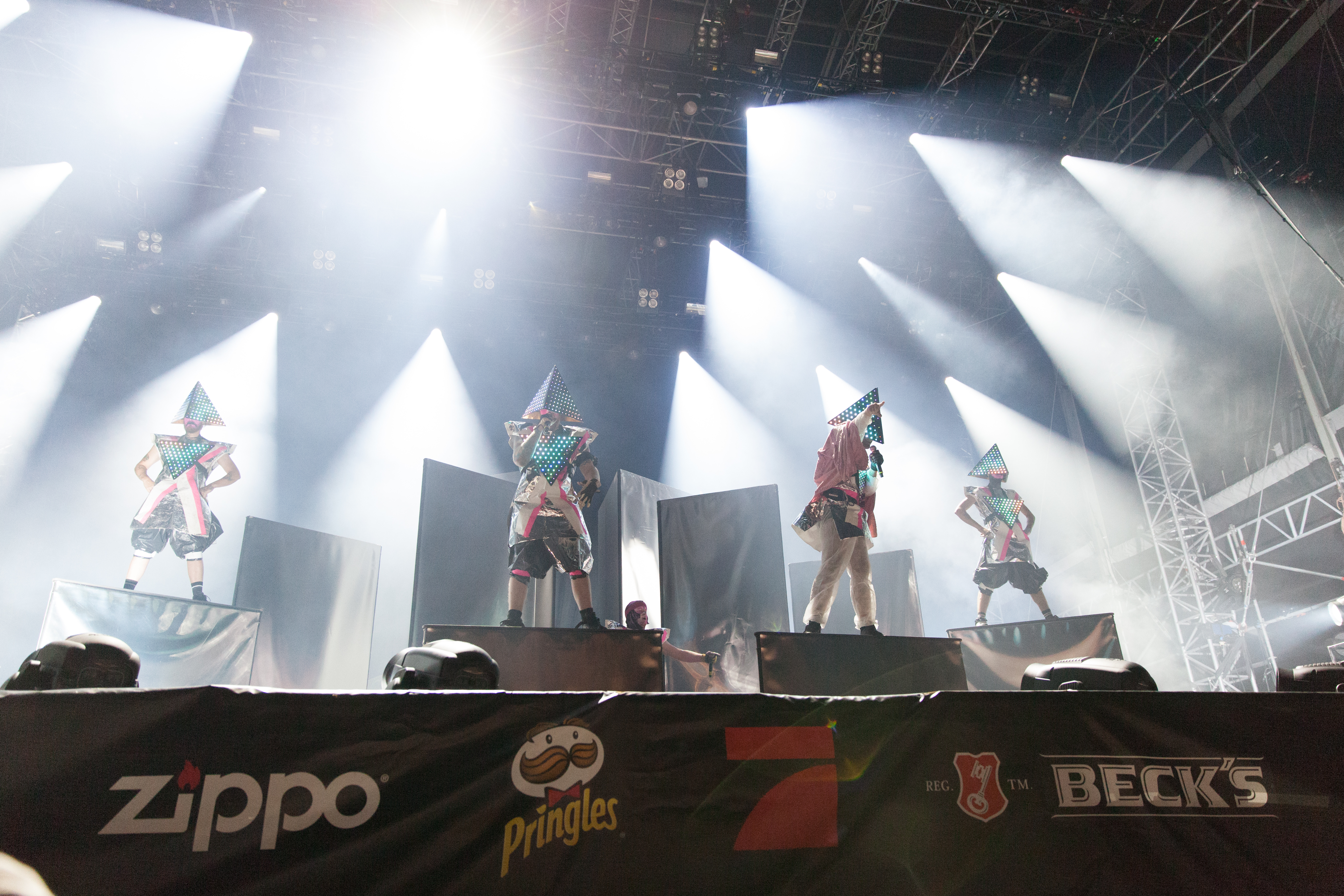 Rock'n'Heim Rock Festival Hockenheim August 2014